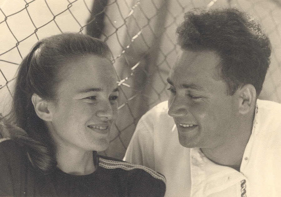 האהבה הגדולה של החיים